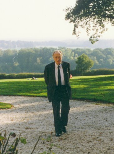 Willi Marxsen in der Pause einer Lehrveranstaltung im Park von "Haus Rothenberge" (Landheim der Uni Münster) bei Münster